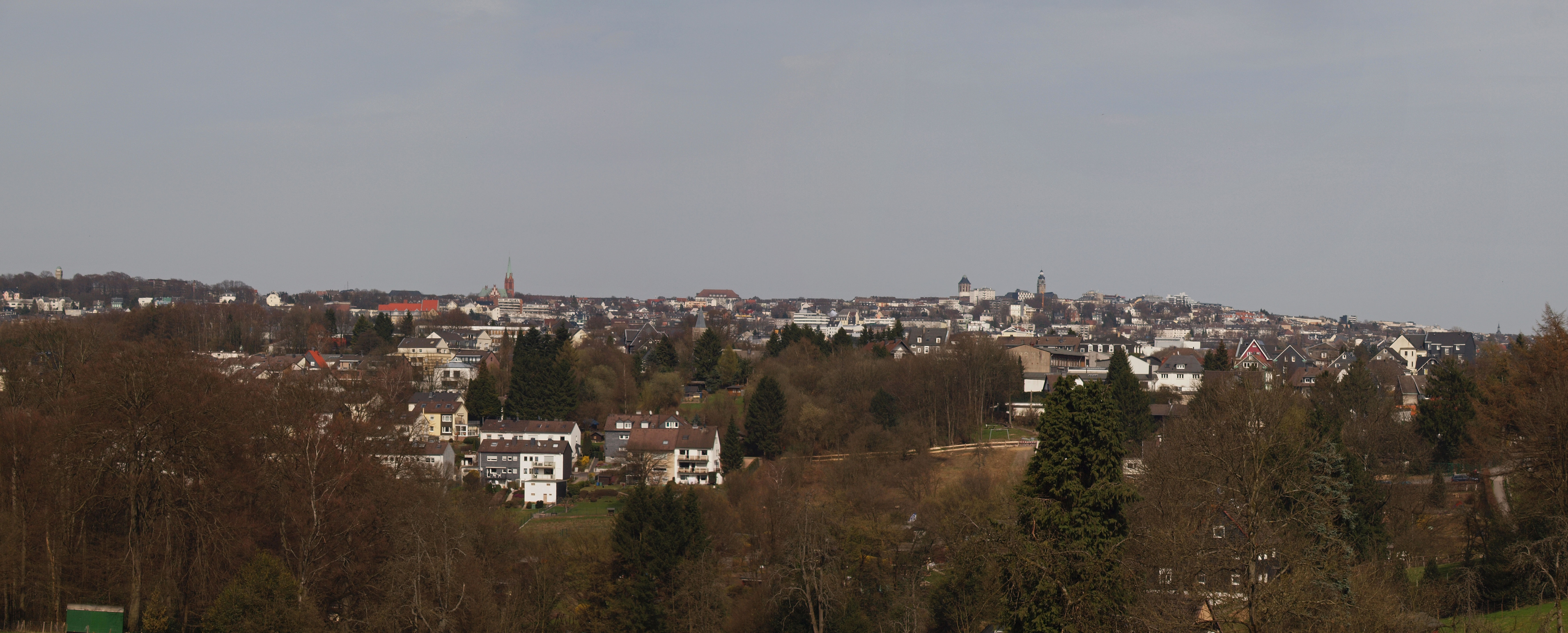 Panorama der Stadt Remscheid. Blickrichtung von Reinshagen Richtung Stadtkegel.